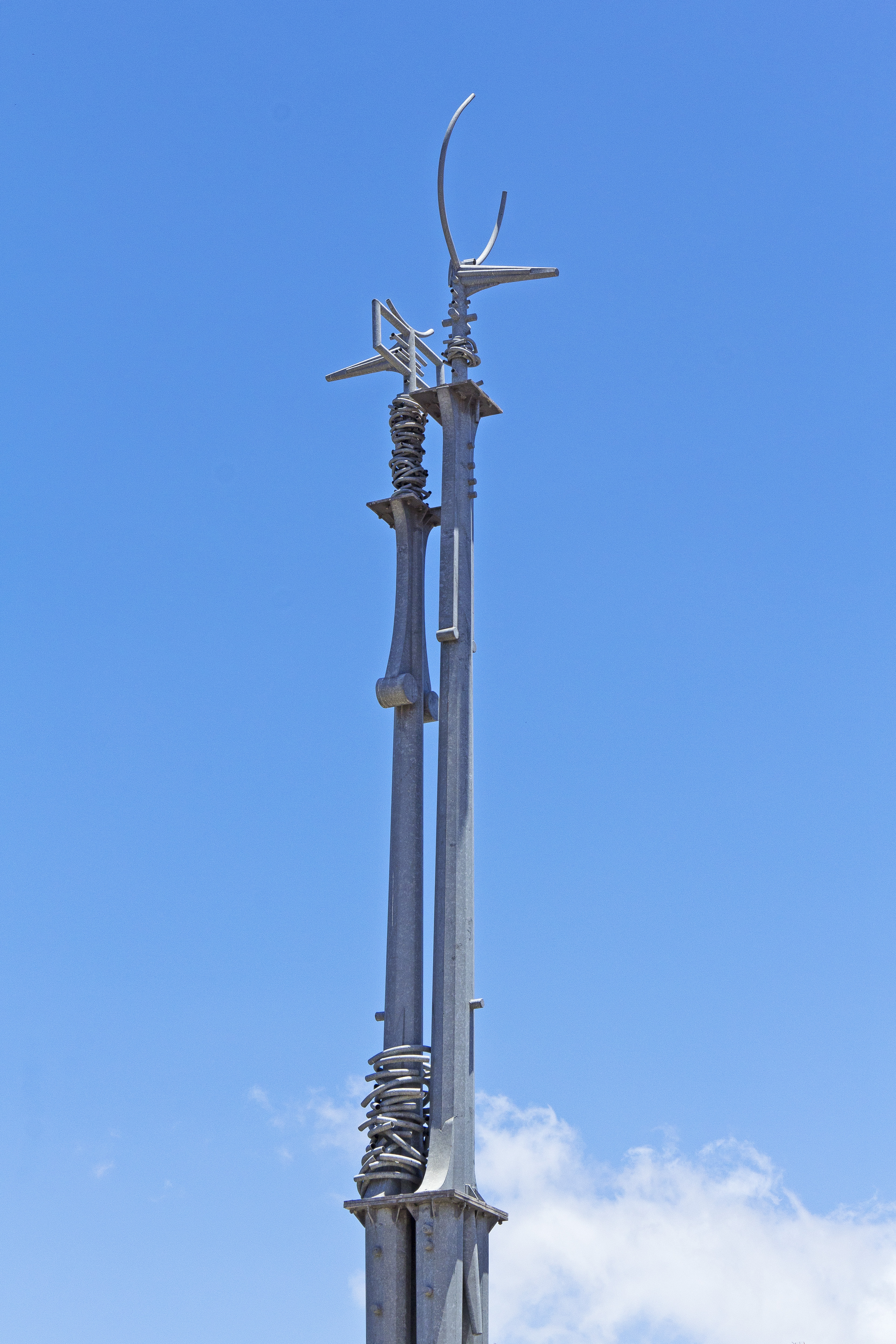 Die Skulptur mit dem Namen „El Mastíl“ des 1942 in La Laguna (Tenerife) geborenen Künstlers Juan José González Hernández-Abad steht im Espacio cultural Viera y Clavijo in Santa Cruz de Tenerife.